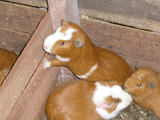 Imagen de unos cuyes en un criadero de lel poblado de Santo Tomás. Cusco-Perú. Abril, 2007.